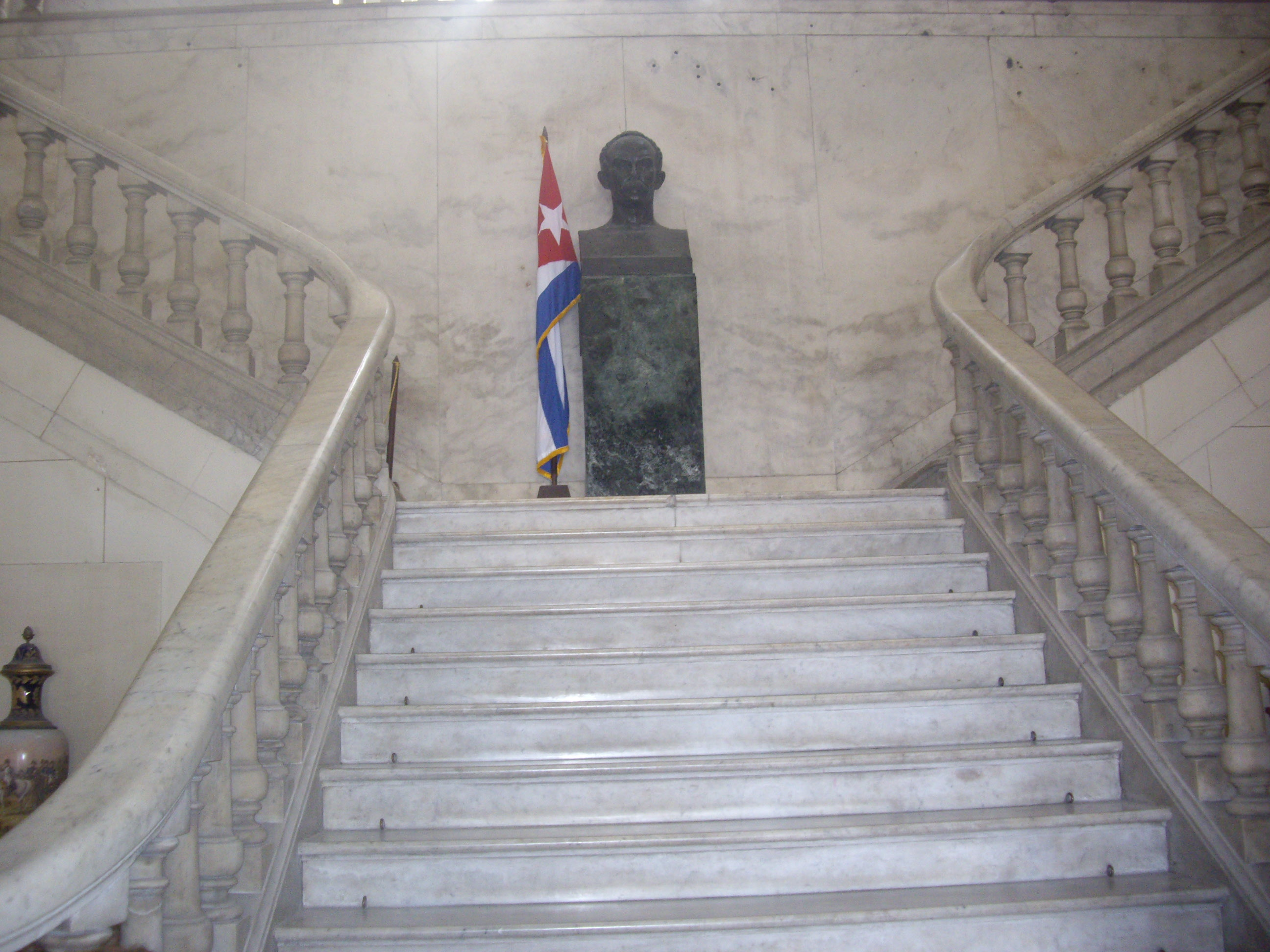 Escala interior del museu de la Revolució de l'Havana. Davant el bust de José Martí i a dalt a la dreta impactes de bales dels successos del 13 de març de 1957